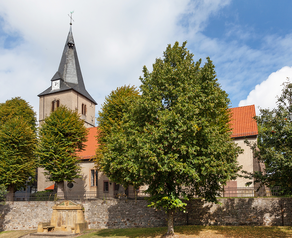 Evangelische Kirche Barntrup, Kreis Lippe This is a photograph of an architectural monument.